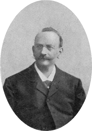 L. E. Meier L. K., München, esperantisto de l' unuaj tagoj, aŭtoro de lernolibro.